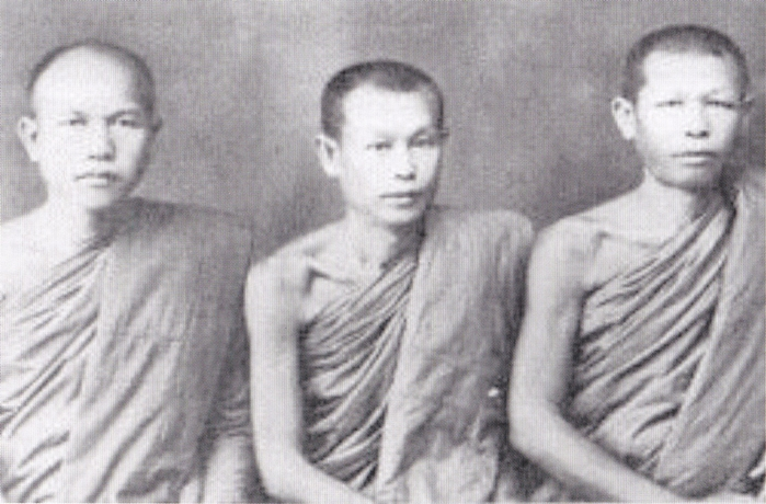 กองทัพธรรมพระกรรมฐาน